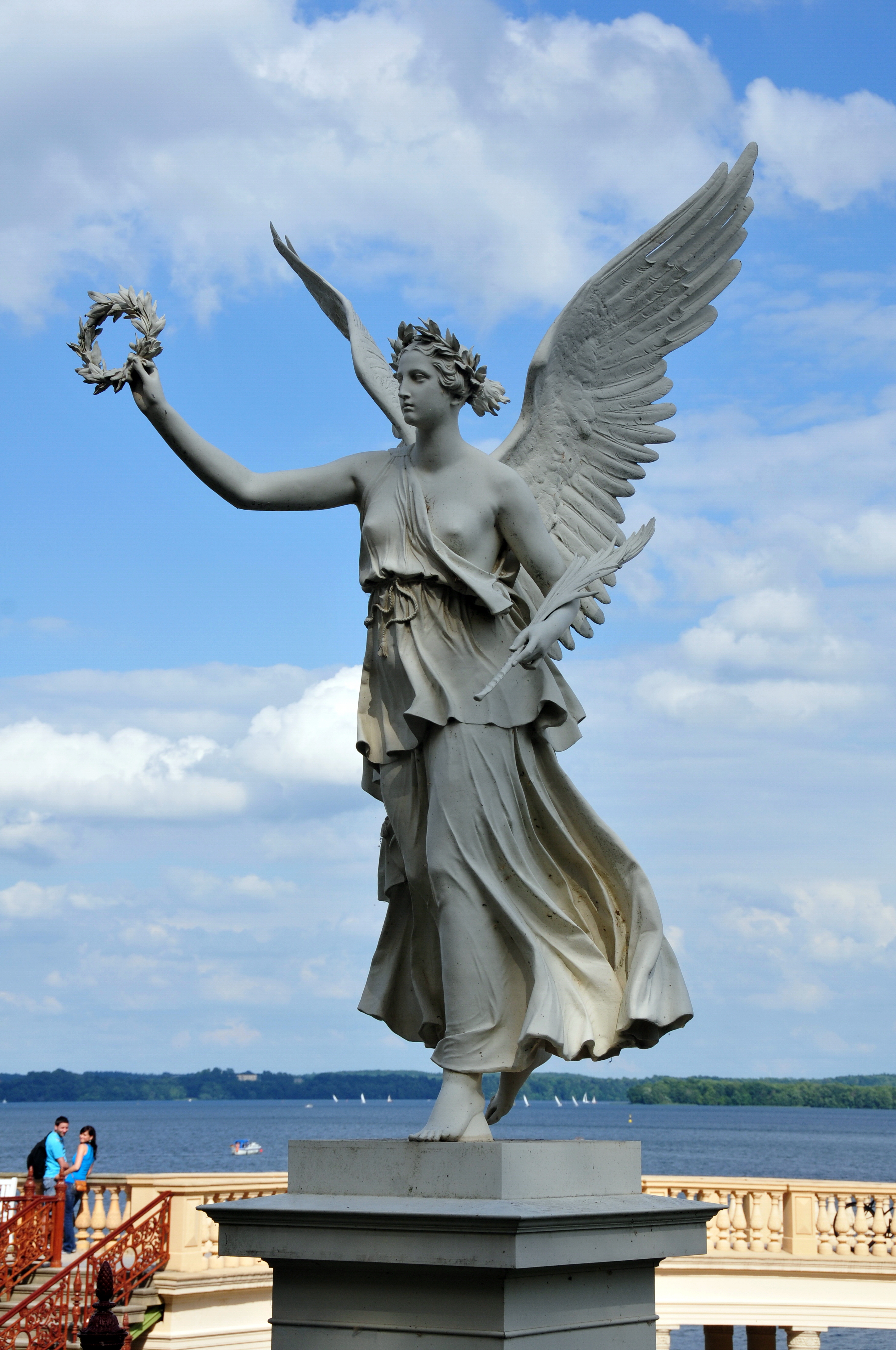 Schwerin; mit 50mm Brennweite von der Orangerie zum Bahnhof die zweite Viktoria auf der Orangerie